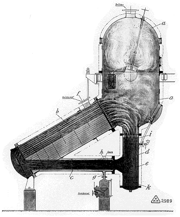 Vogelbusch Schraegrohr-Verdampfer